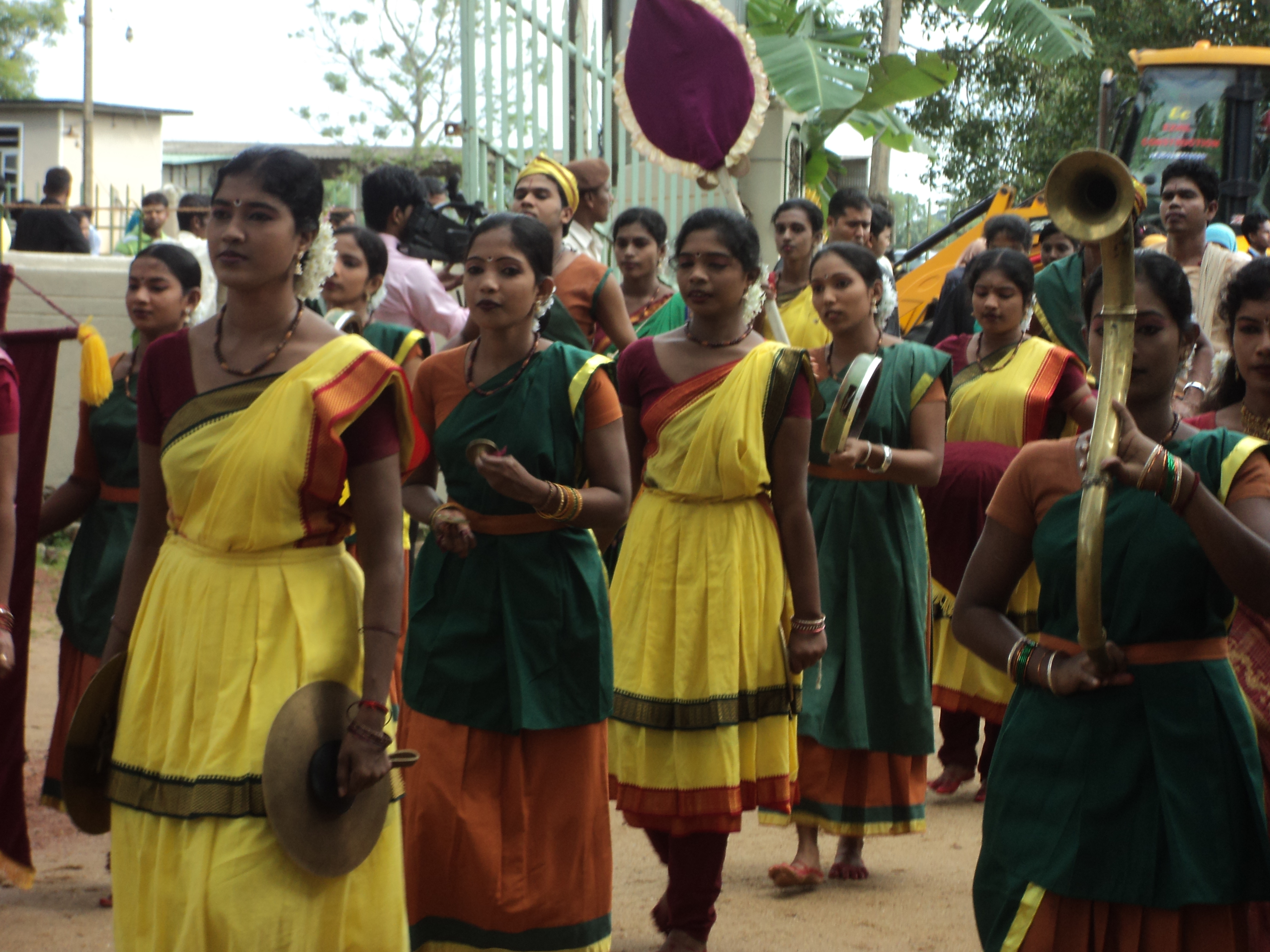 கிழக்குப் பல்கலைக் கழகத்த்கின் இன்னிய அணிக் குழுவினர், பட்டமளிப்பு விழாவின் போது